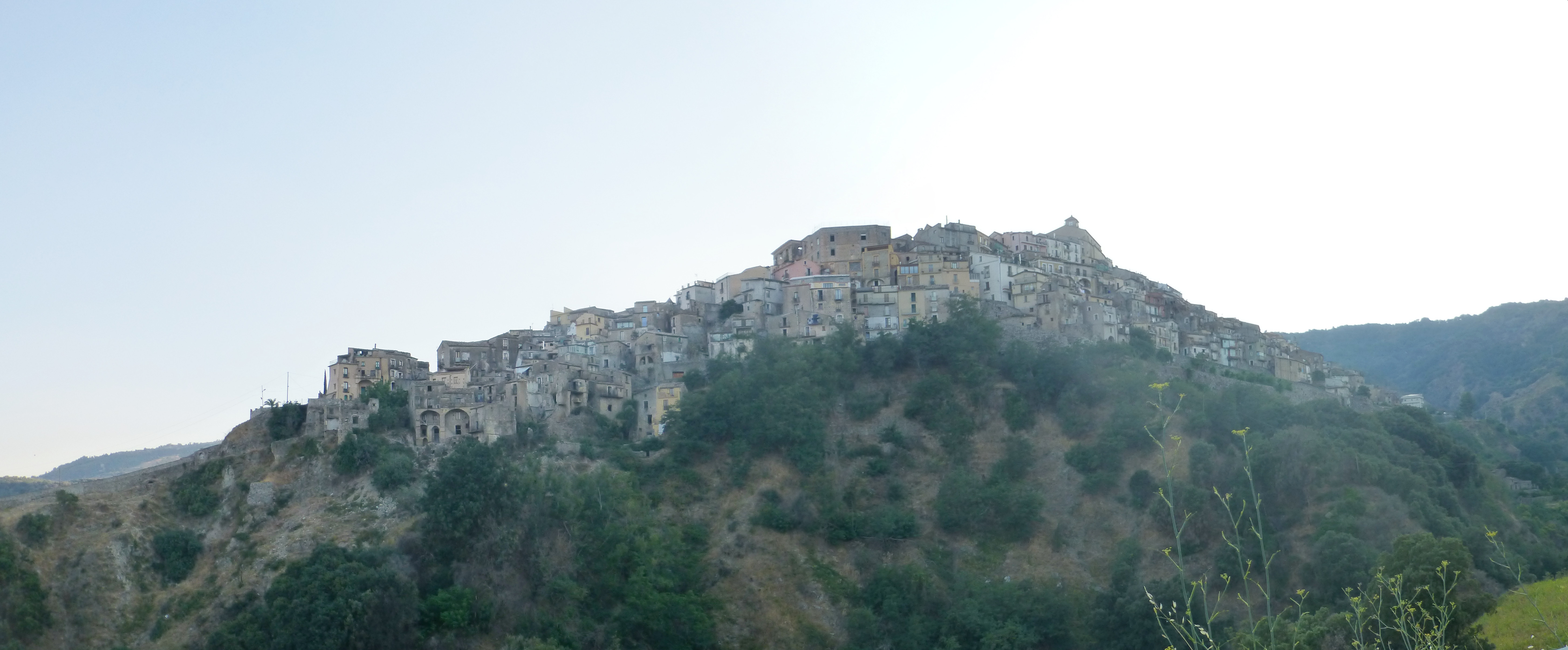 Panorama Badolato superiore